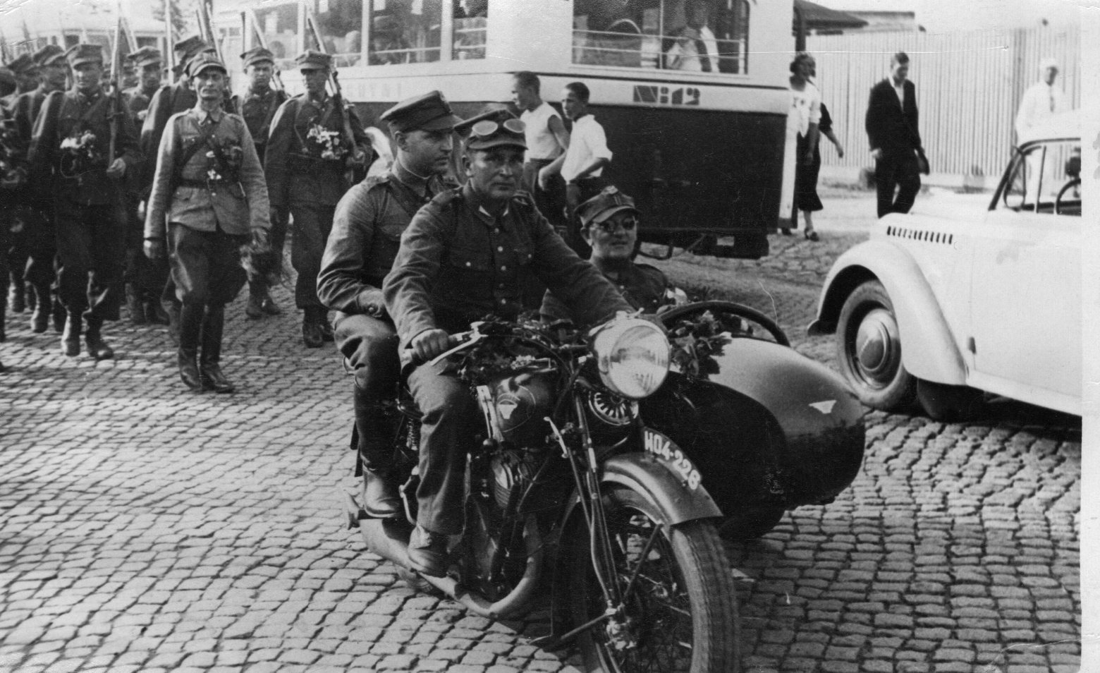 Major Stanislaw Zaucha na defiladzie w Gdyni w 1939r .